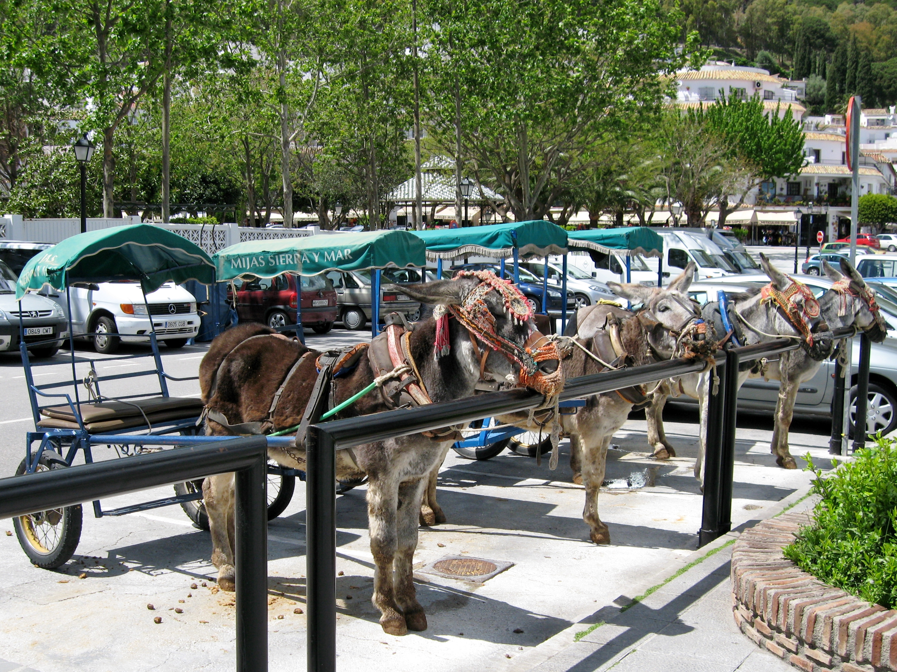 Eseltaxis (Burro-Taxi) in Mijas, Provinz Málaga, Andalusien, Spanien